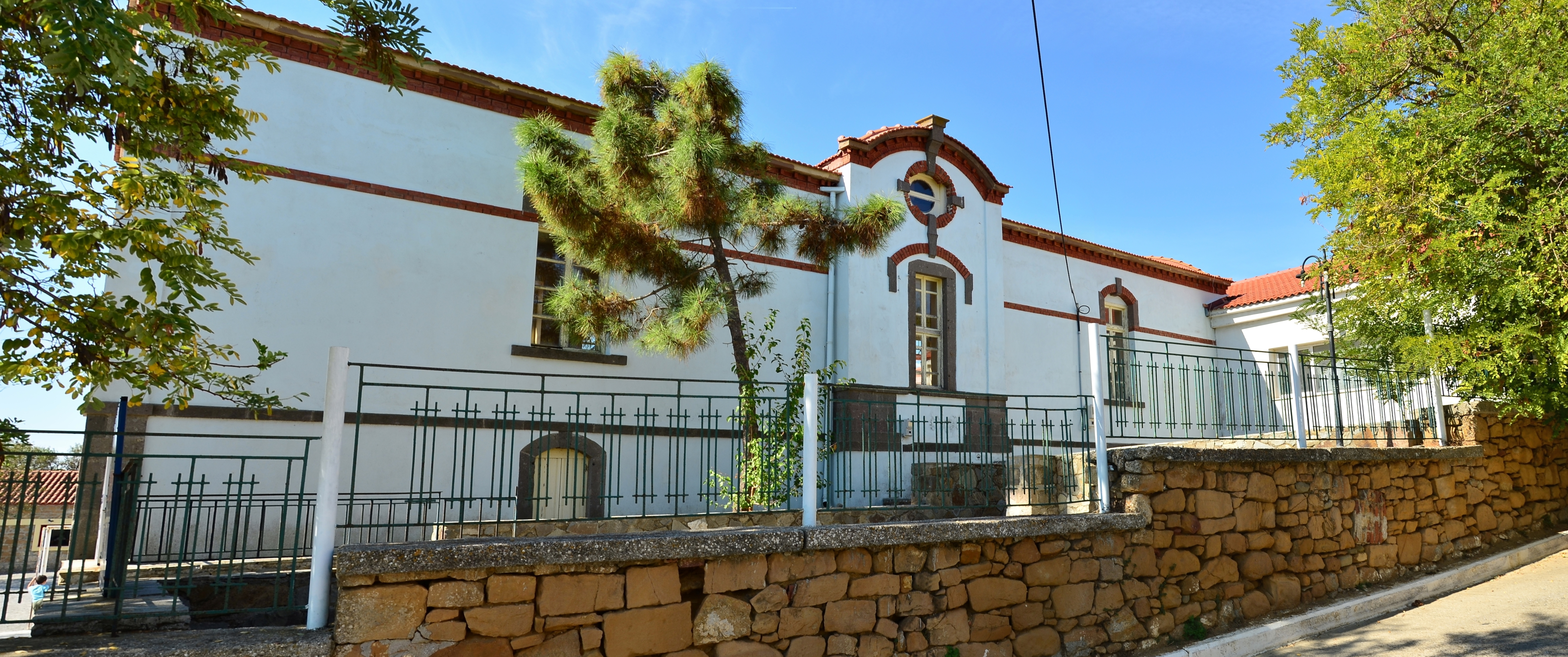 το σχολείο Αδειοδότηση Το παραπάνω αρχείο διανέμεται υπό τις δύο παρακάτω άδειες χρήσης. Μπορείτε να επιλέξετε την άδεια της προτίμησής σας.